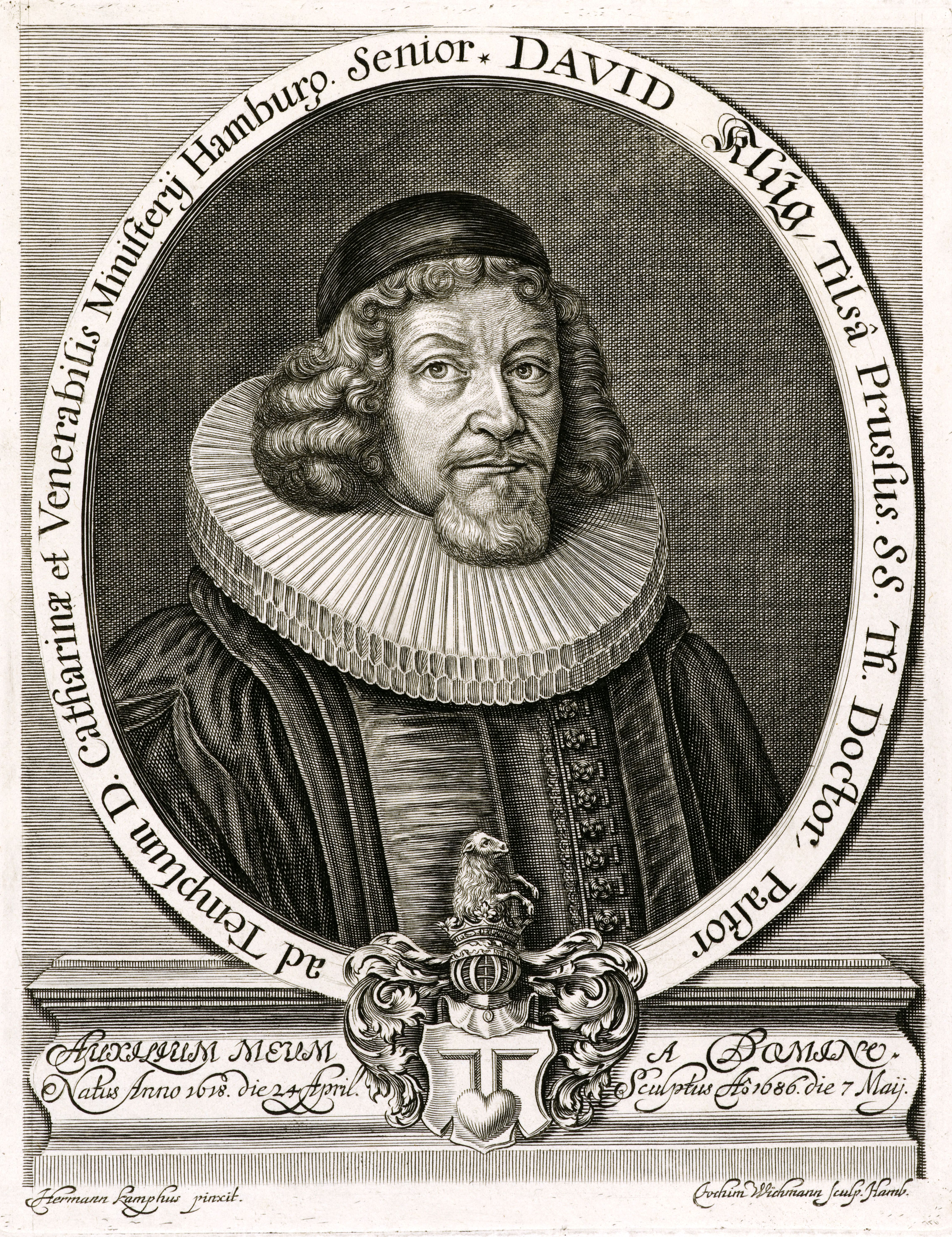 Bildnis von David Klug